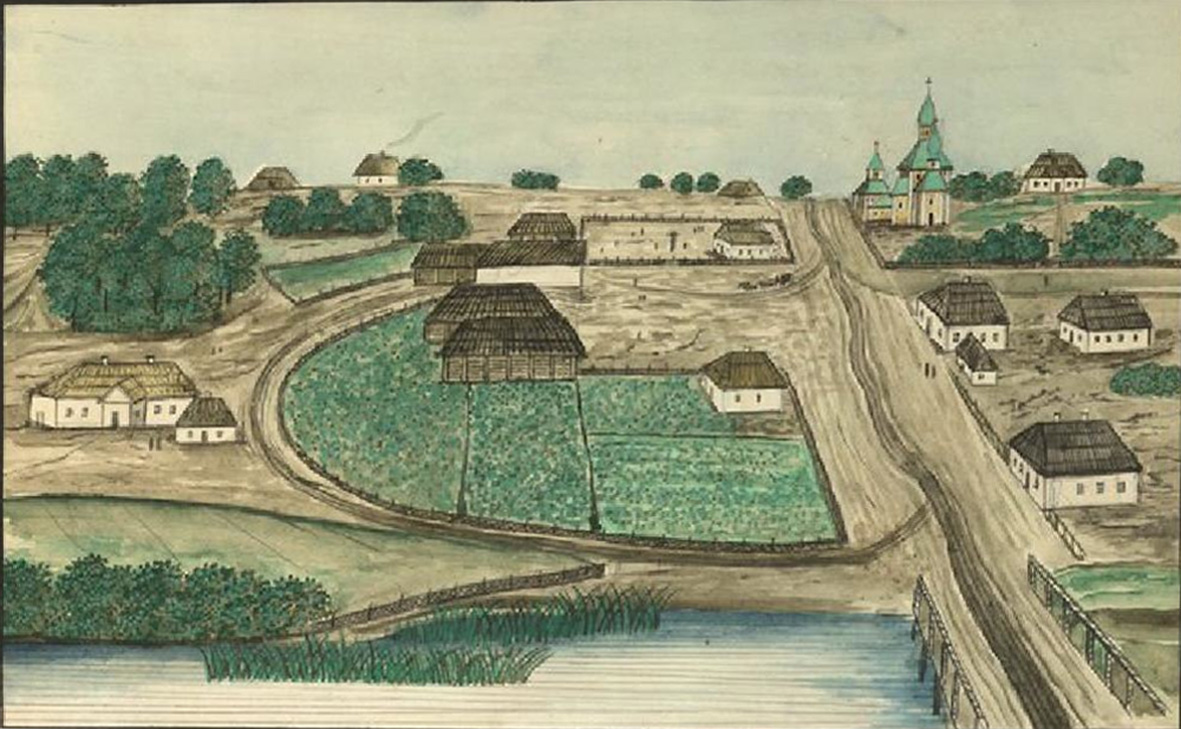 Петропавлівська Борщагівка. Домінік П'єр де ля Фліз. «Медико-топографічний опис державних маєтностей Київської округи з зображенням деяких природних витворів рослинного і тваринного світу, разом із статистикою кожного села, їхнім виглядом, зробленим з натури, зображенням селянських костюмів та географічною картою Київської округи». Київ, 1854. - С. 728.